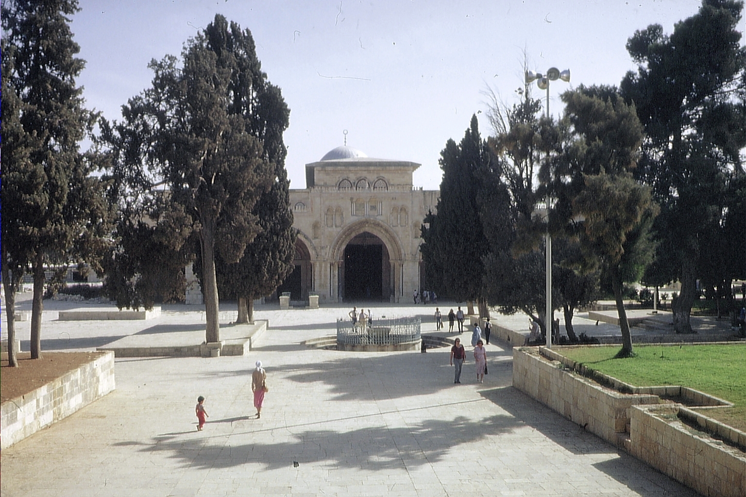 Al Aksha at Jerusalem